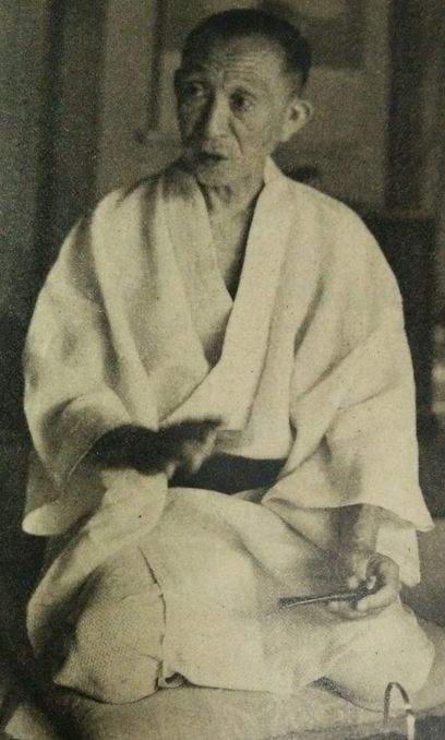 宇野要三郎（大審院部長、全日本弓道連盟初代会長）